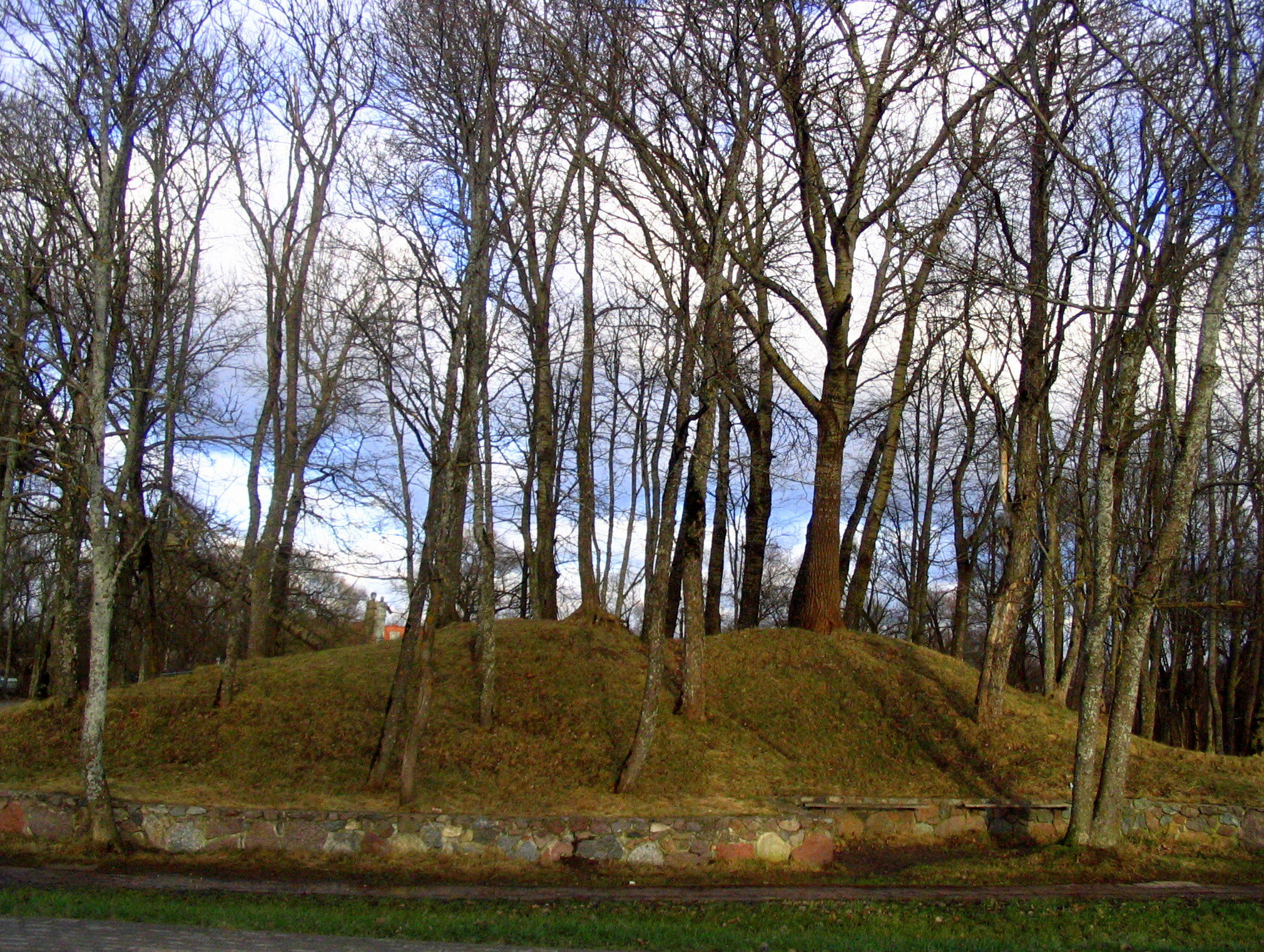 Riteņdārzs